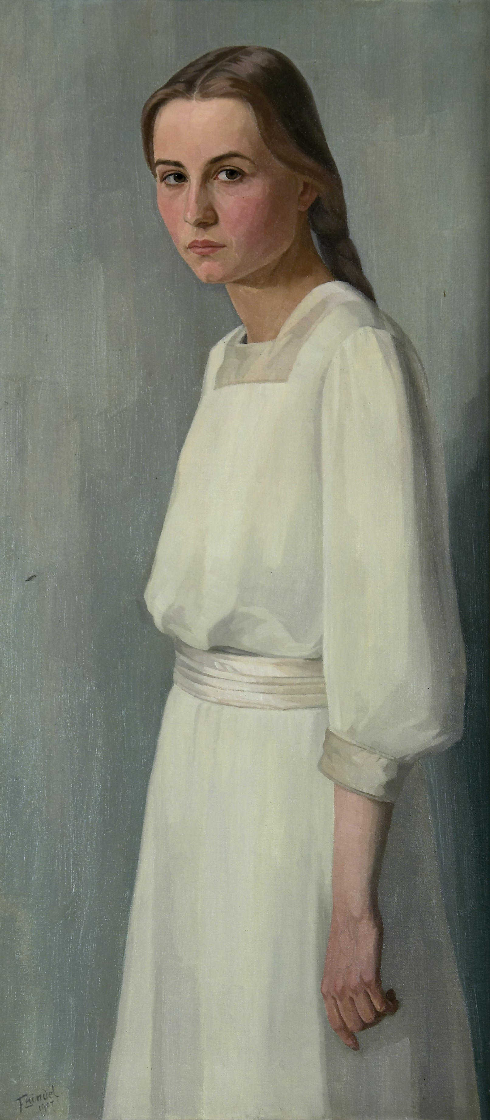 Porträt von Paula Bosch